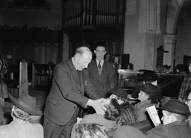 Teitl Cymraeg/Welsh title: Iachau trwy ffydd yn Eglwys Fethodistaidd Llandrindod Ffotograffydd/Photographer: Geoff Charles (1909-2002) Nodyn/Note: Image of Revd Hywel Harris' faith healing meeting at St John's Methodist Church, Llandrindod Wells. Dyddiad/Date: January 5, 1950 Cyfrwng/Medium: Negydd ffilm / Film negative Cyfeiriad/Reference: (gch00160) Rhif cofnod / Record no.: 3367276 Rhagor o wybodaeth am gasgliad Geoff Charles yn Llyfrgell Genedlaethol Cymru More information about the Geoff Charles Collection at the National Library of Wales